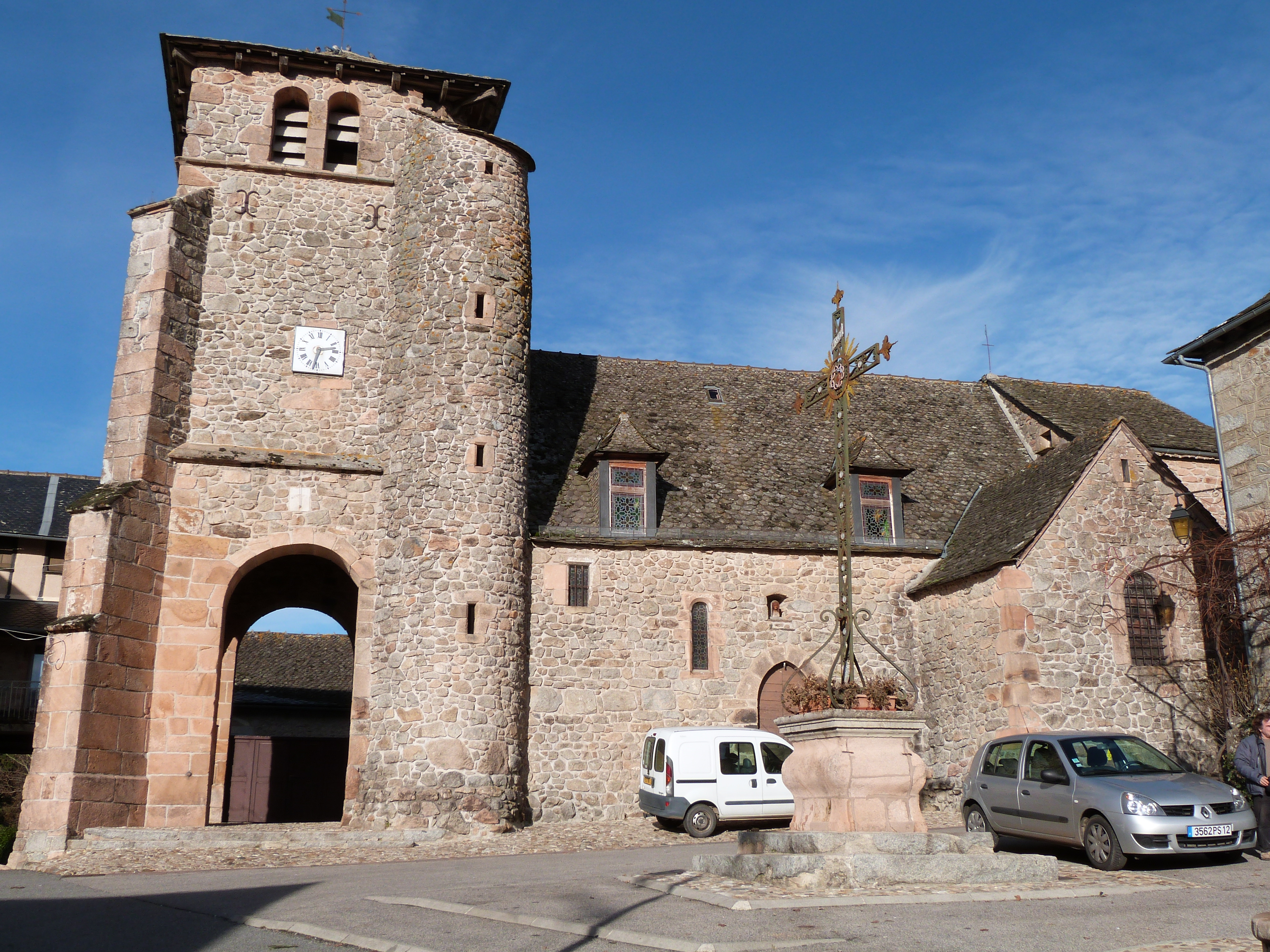 Façade sud-ouest de l'église Saint-Jean-Baptiste, donnant sur la place centrale à La Bastide-l'Évêque (Aveyron)